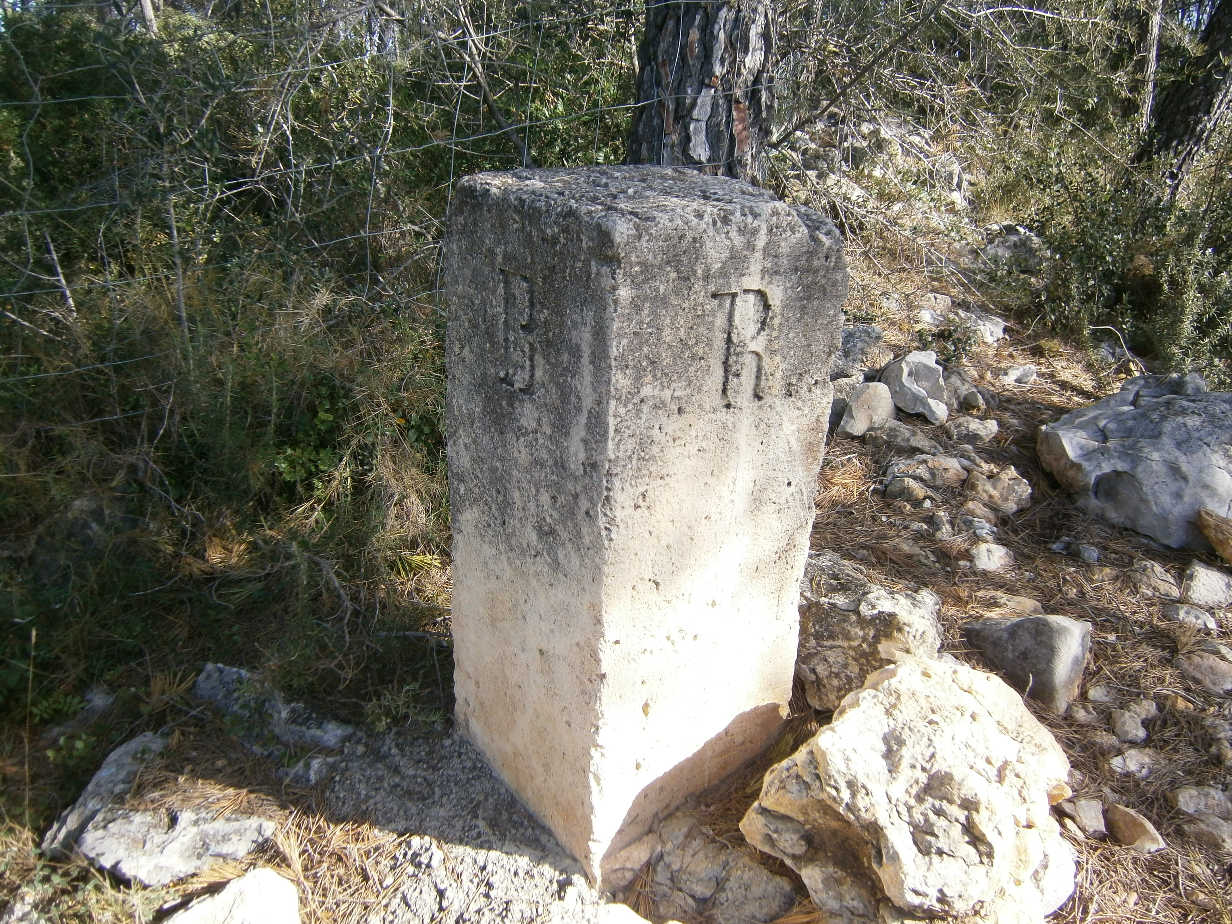 Fita o pedró on convergeixen els límits dels termes municipals de Bonastre, Albinyana, Roda de Berà i El Vendrell (SV)